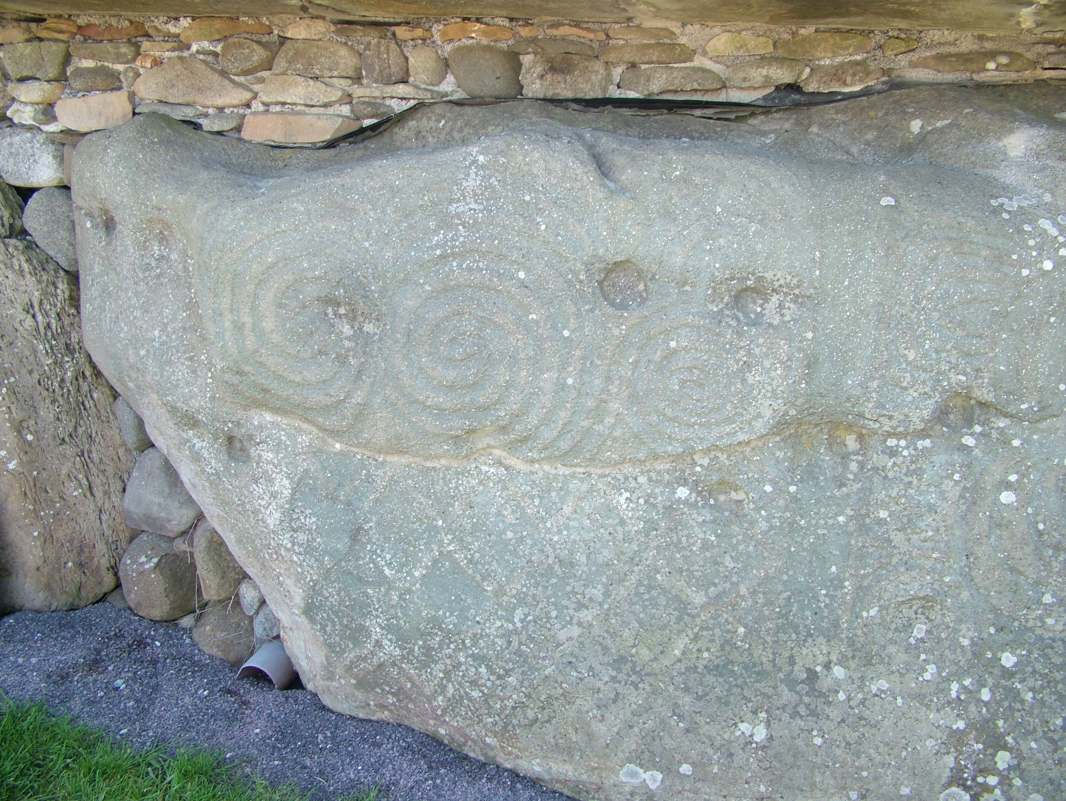 Newgrange, Irland, der Randstein 52, Ausschnitt